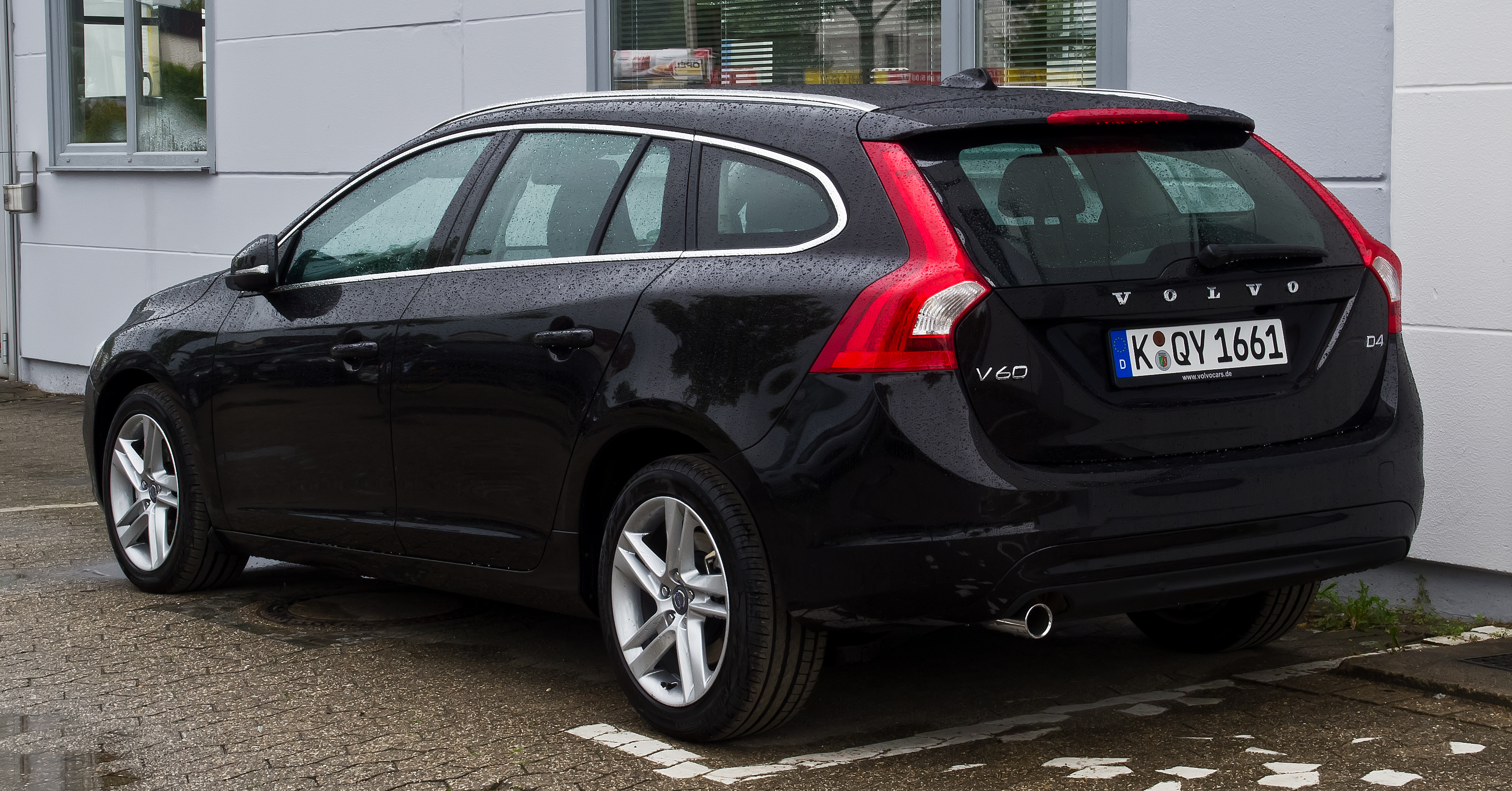 Volvo V60 D4 Summum (Facelift)